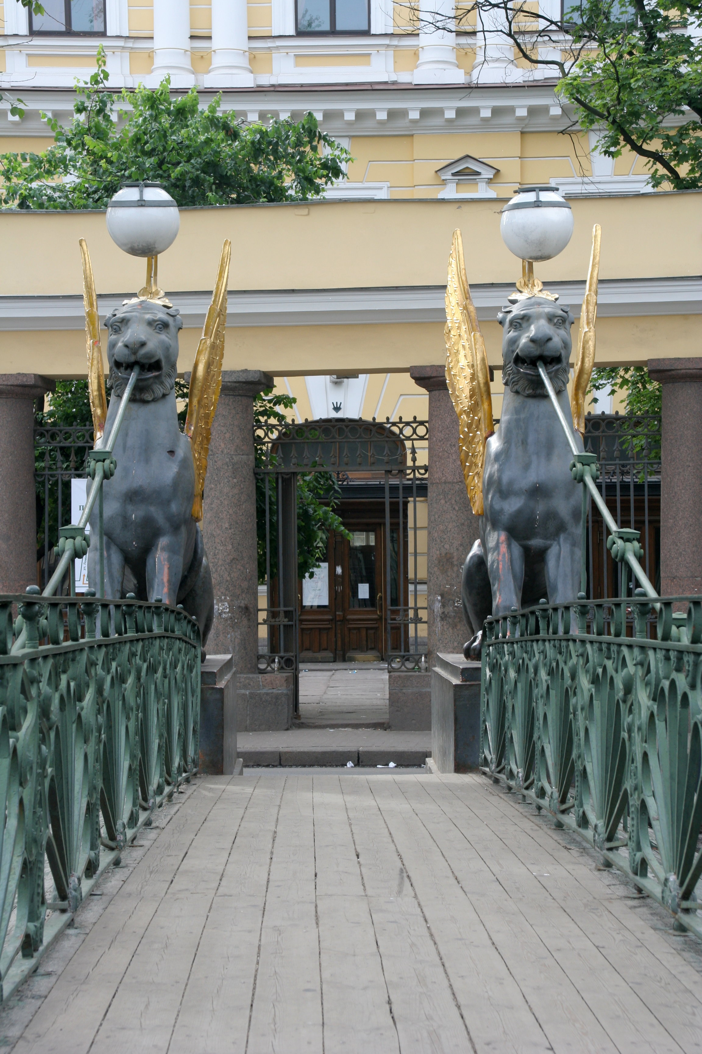 Bank bridge in St-Petersburg